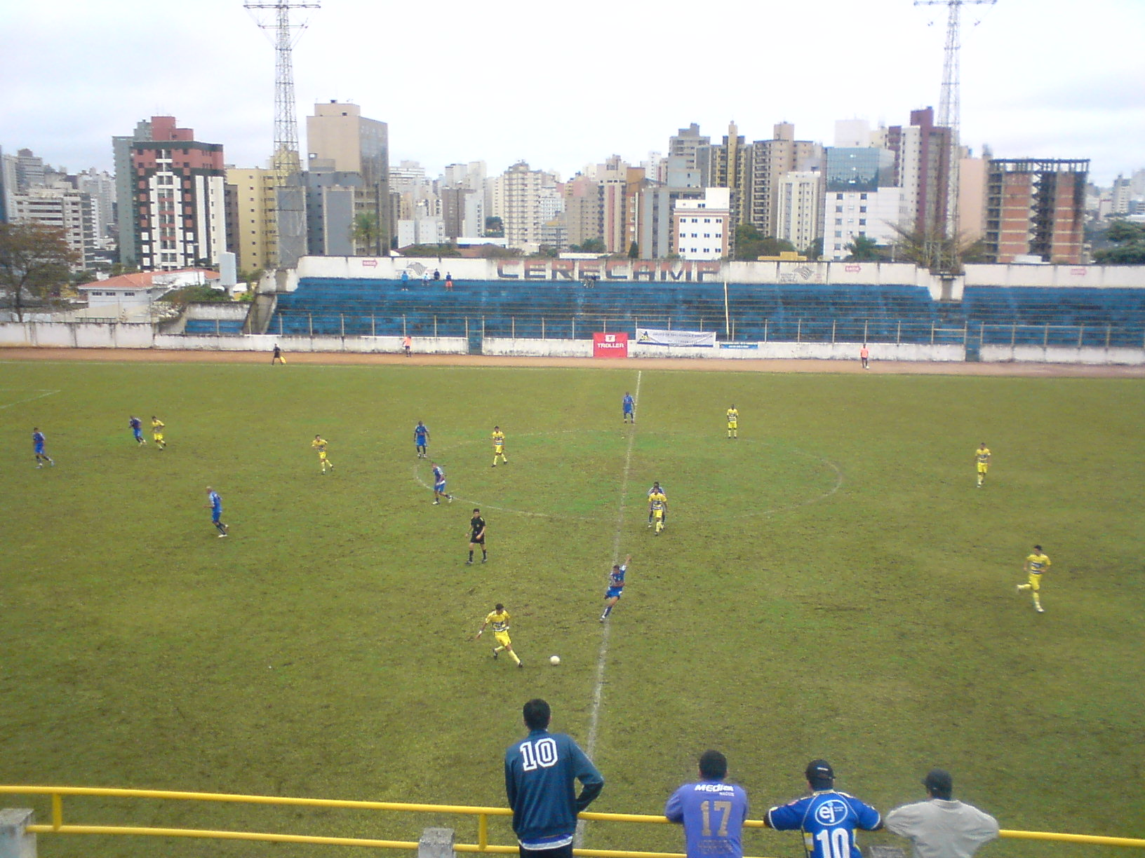 Estádio Cerecamp,mais conhecido como campo da Mogiana.